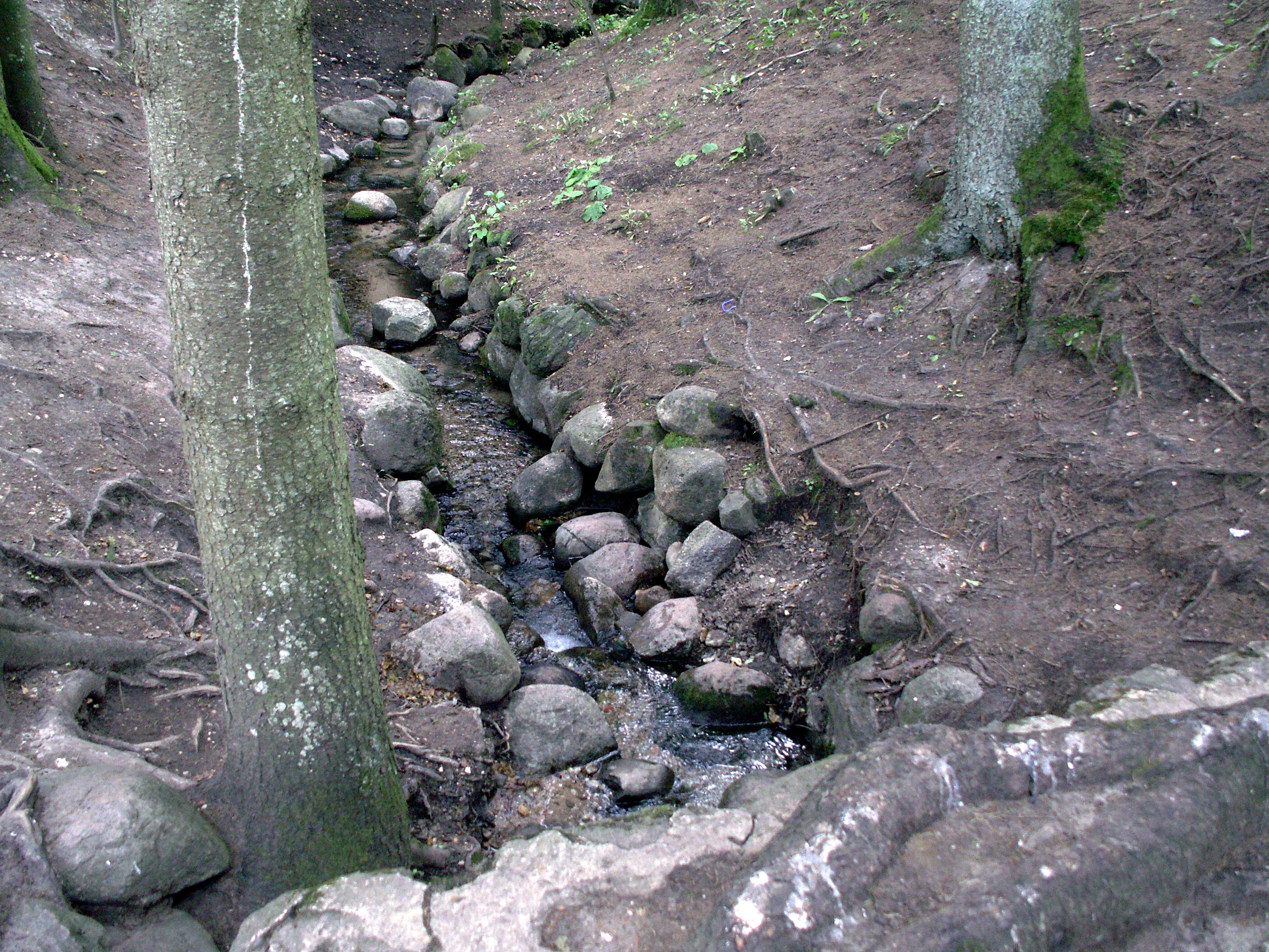 Kevelės šaltiniai, Vytinių pagastas, Latvija